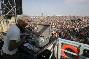 Dit is DJ Sandstorm op Concert at sea 2006. Toestemming gevraagd aan Sandstorm zelf, hij is eigenaar van deze foto.